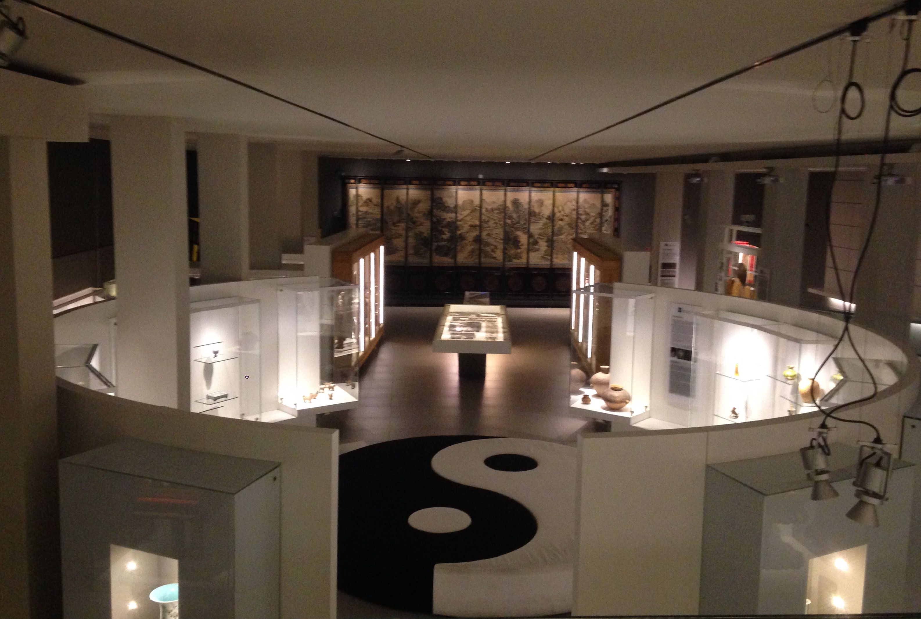 Museo d'arte cinese ed etnografico a parma